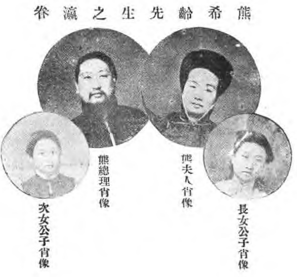 治家全書圖像